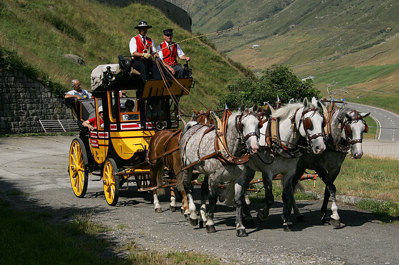 Gotthard-Postkutsche auf der alten Passstrasse ob Hospental